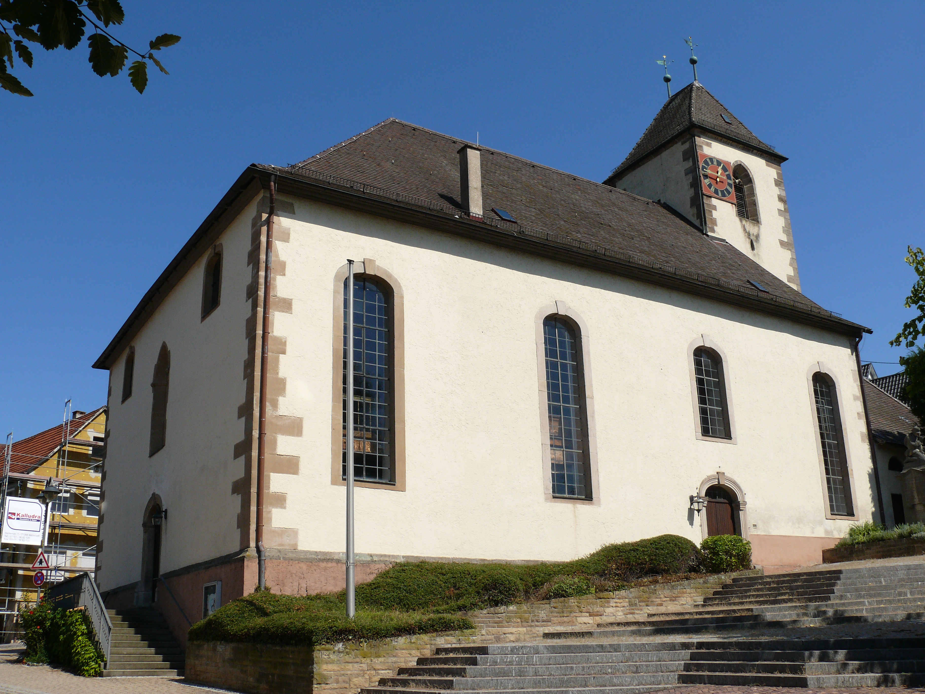 Die Schnaiter Kirche neben dem Silcher-Museum in Weinstadt-Schnait.